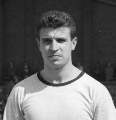 Ton van den Hurk in 1961.